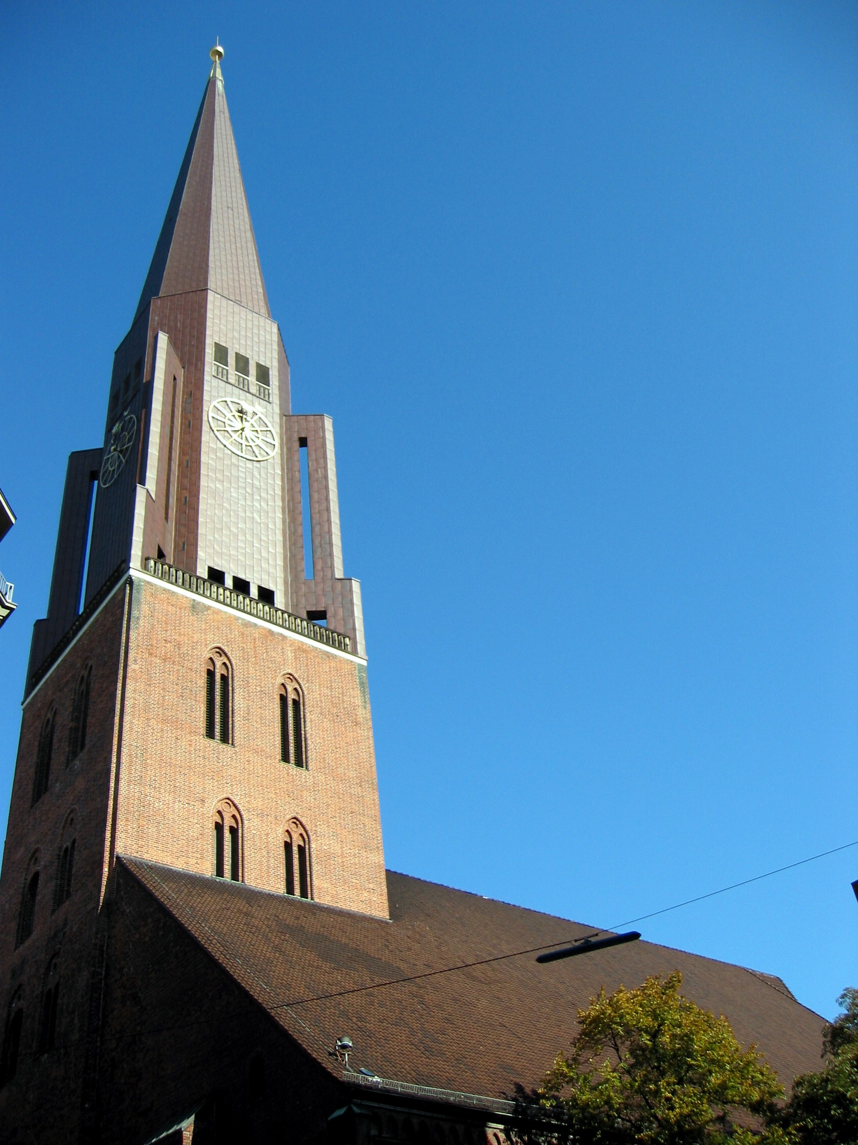 St Jacobi HamburgThis is a photograph of an architectural monument.